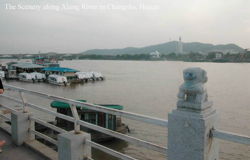 Yuelu Mountain in Changsha,Hunan,China·湖南长沙岳麓山